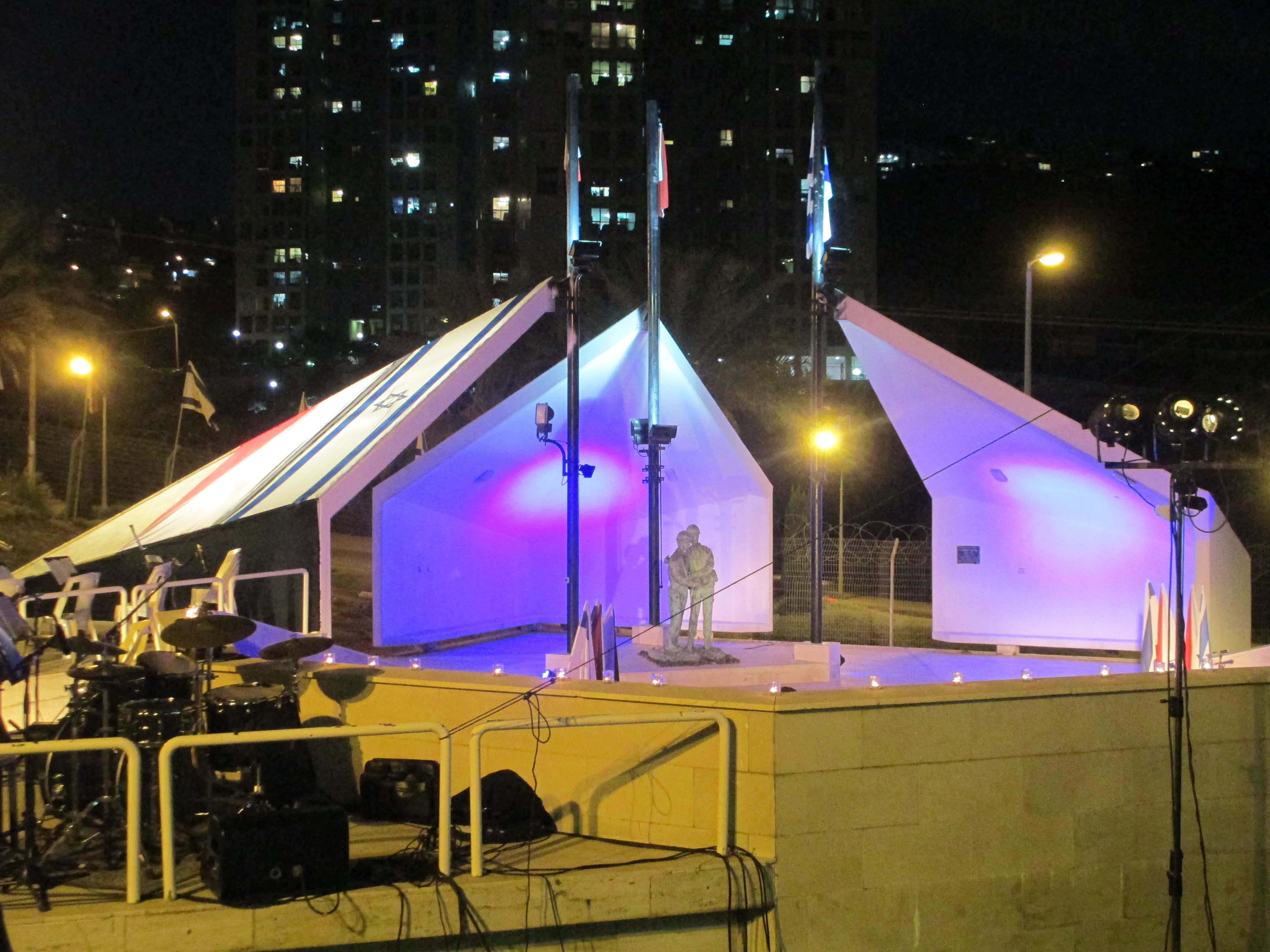 אנדרטת חללי חיל הרפואה בחיפה